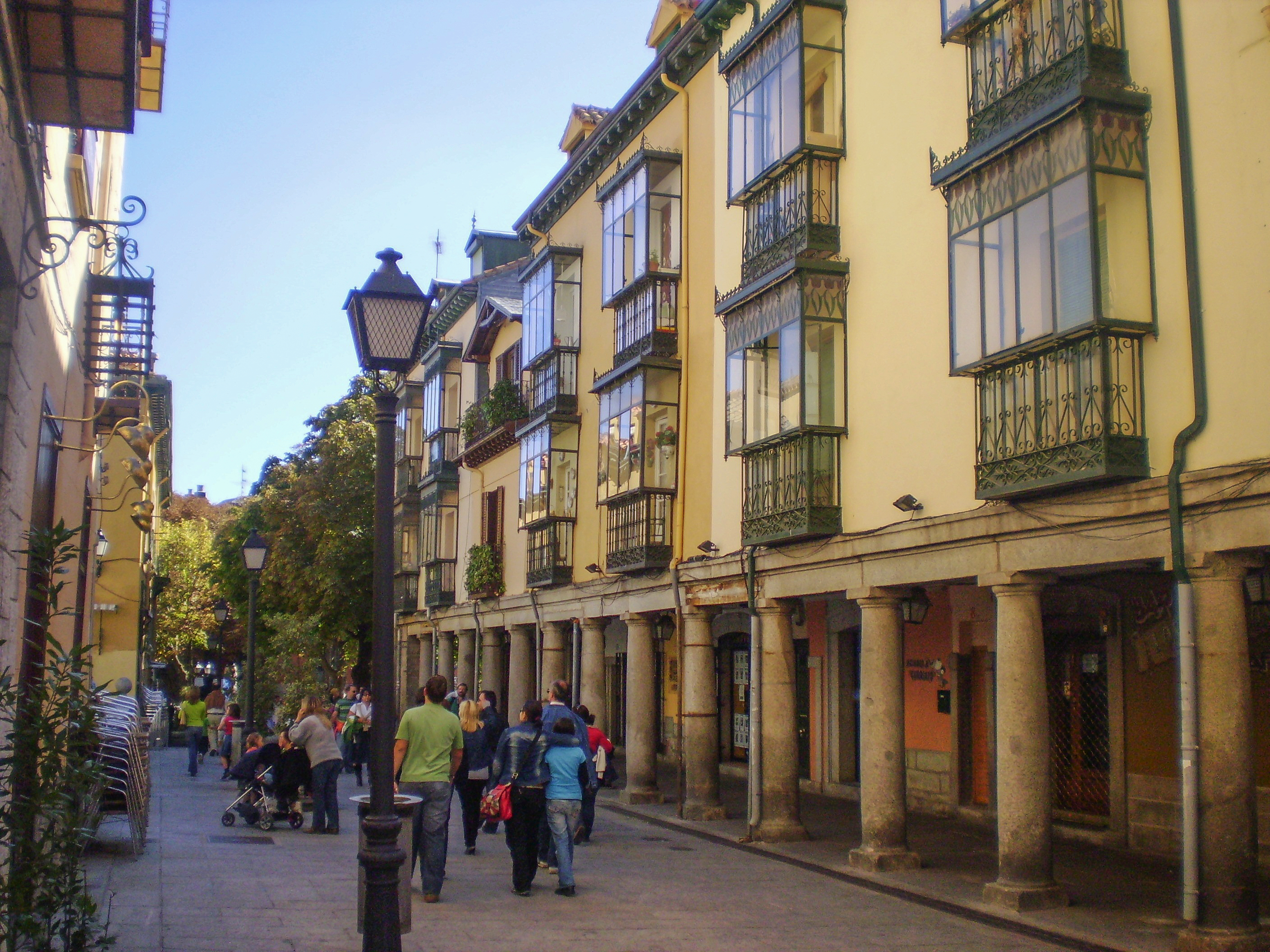 Reina Victoria St., San Lorenzo de El Escorial. Community of Madrid, Spain